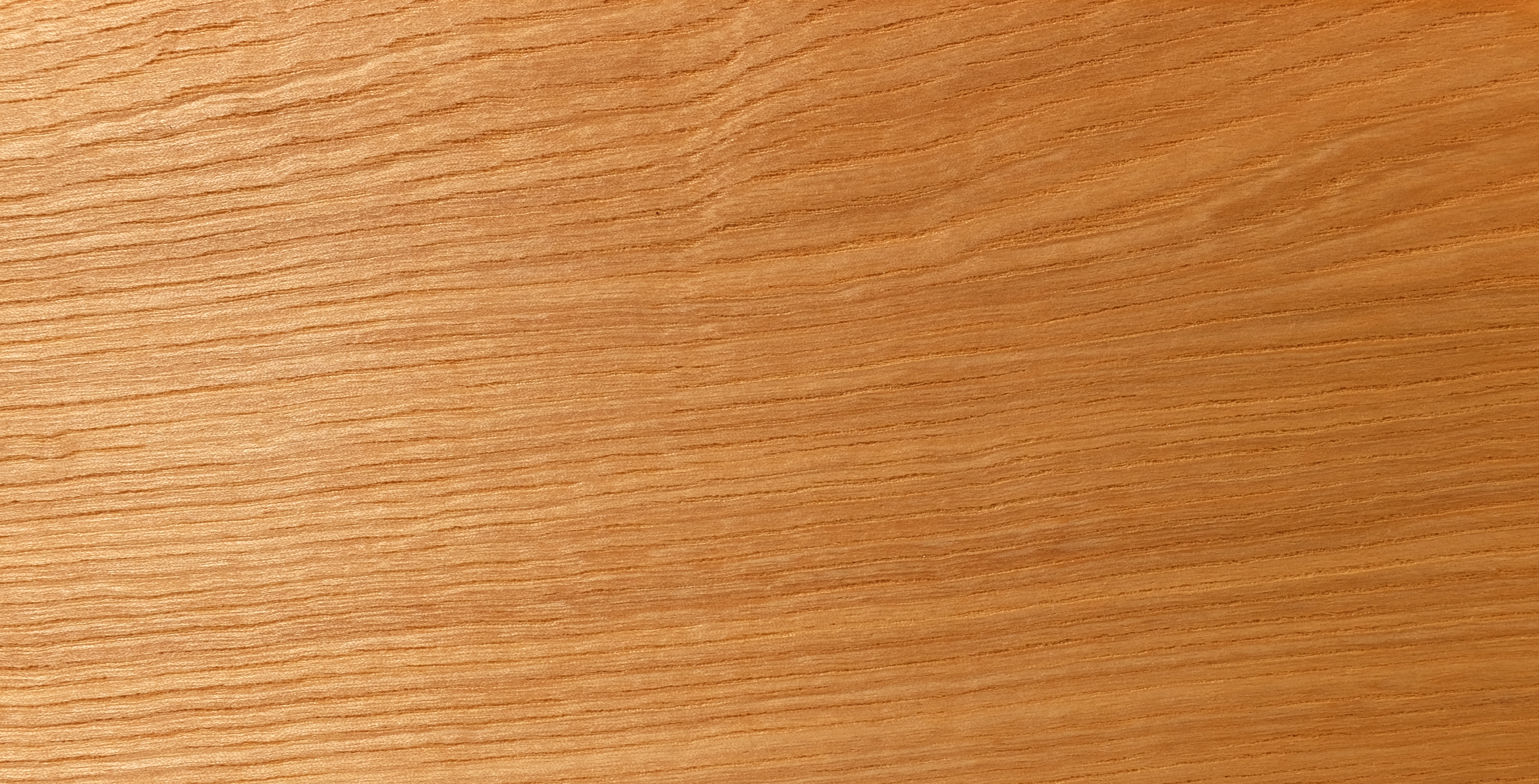 gemesserte Furnier des Senbaums, geölt, nicht geschliffen